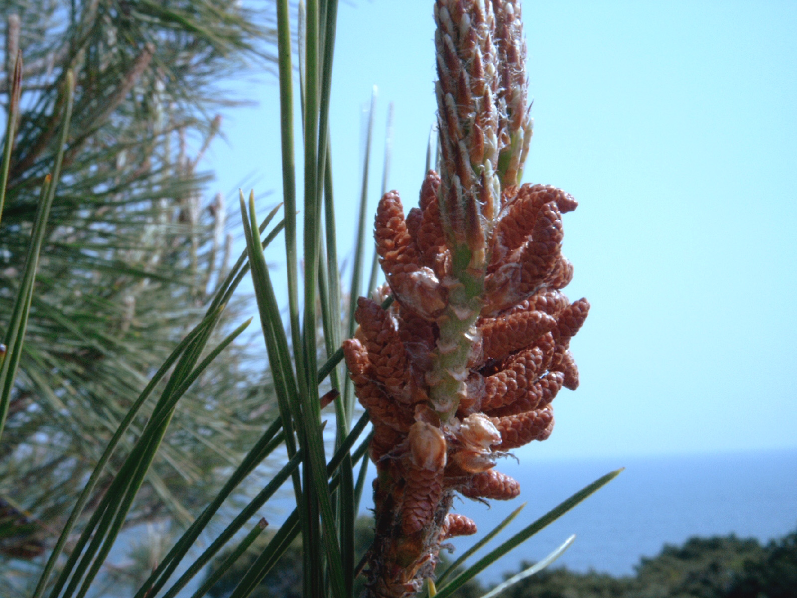 Pinus pinaster, pollen cones